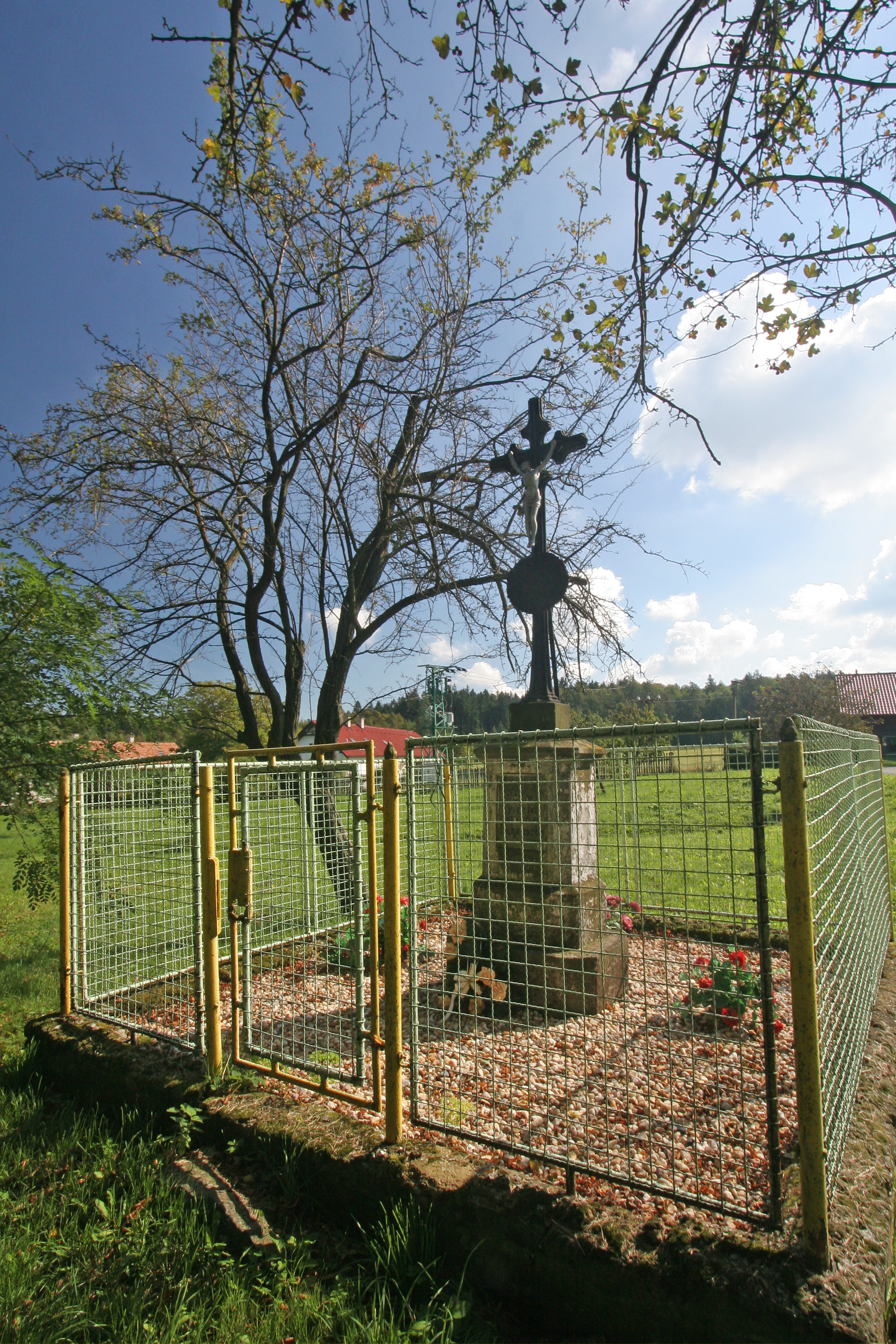 Sušice křížek